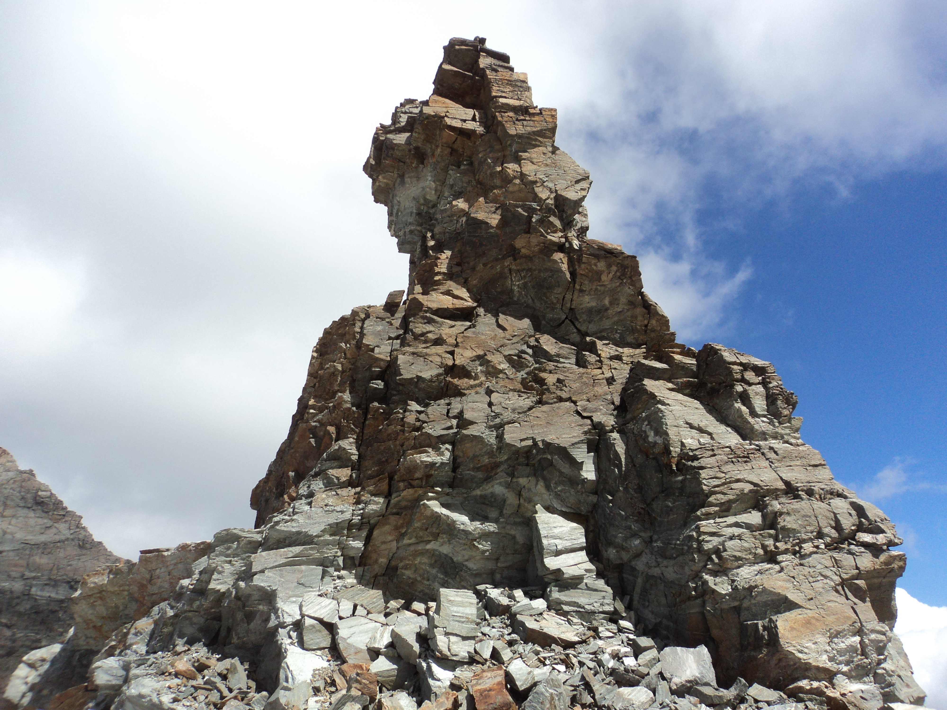 Il Dito degli Apostoli nei pressi della Torre di Sant'Orso